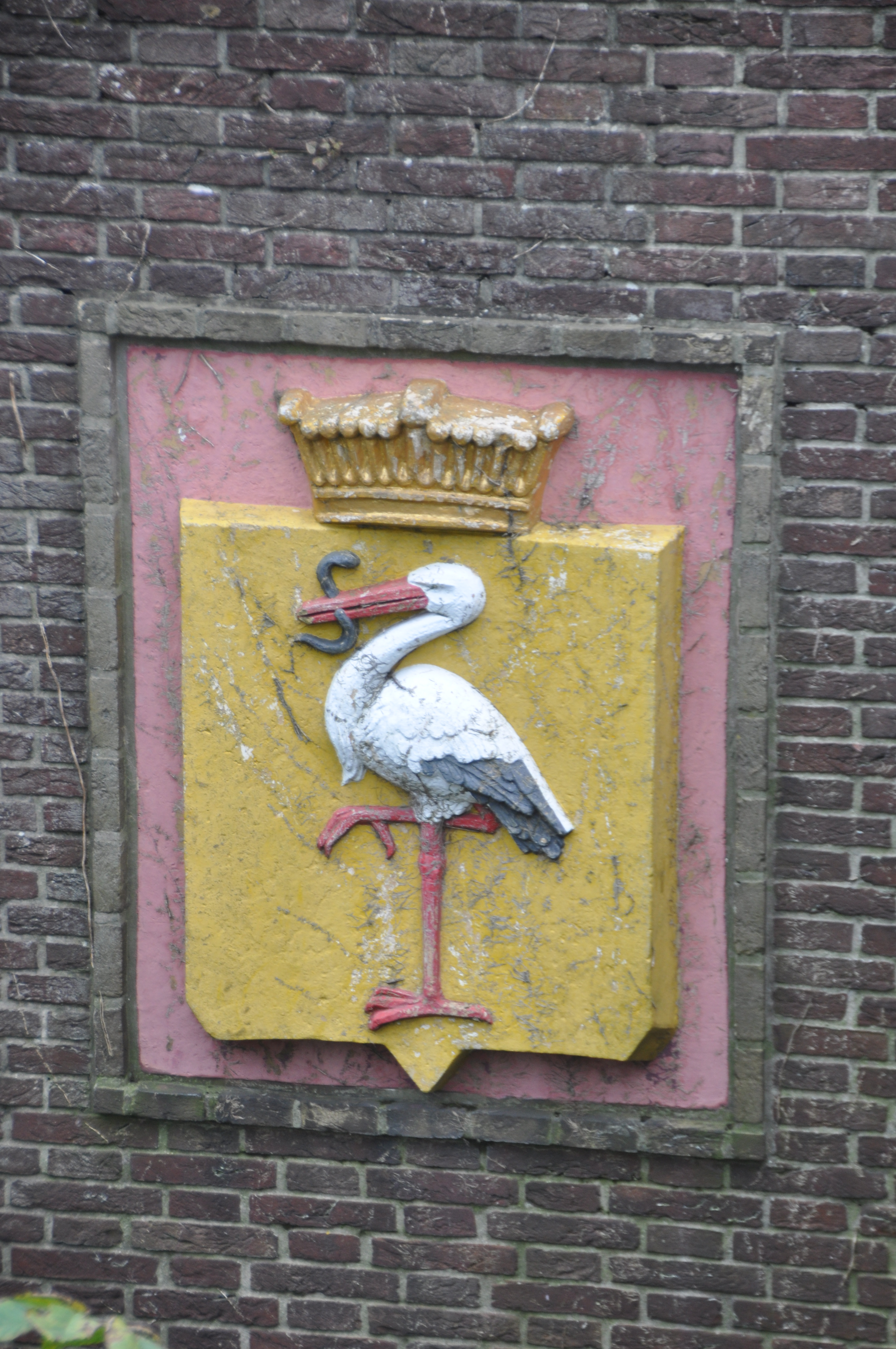 Bruggen in Den Haag.